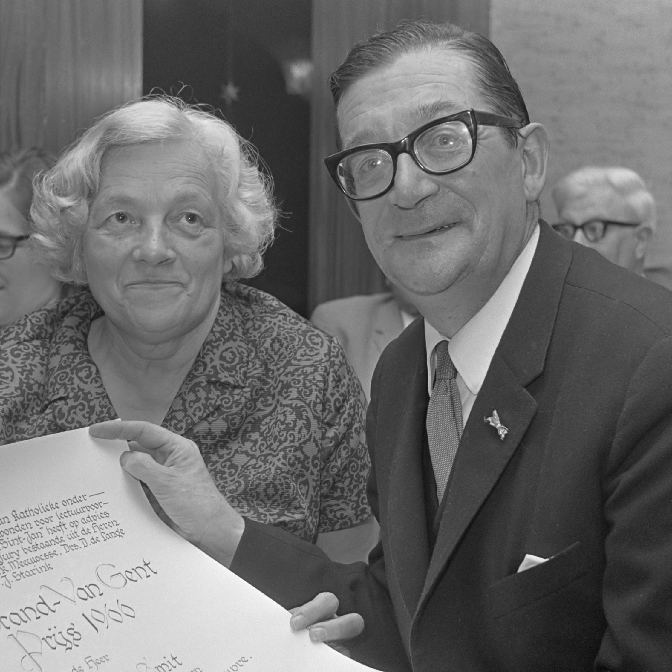 Brand-van Gentprijs 1966, voor Gabriel Smit, hier samen met zijn vrouw 17 mei 1966